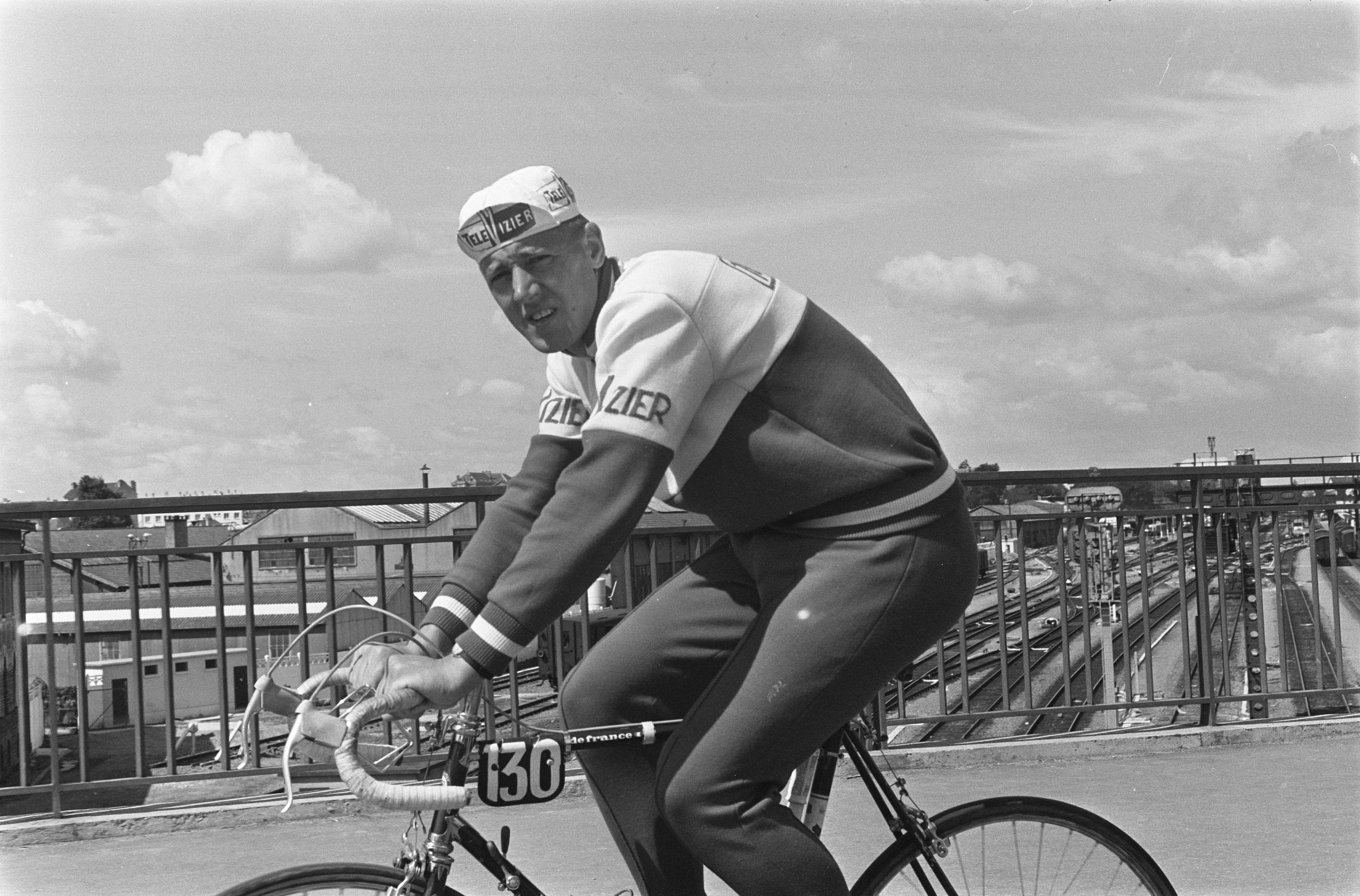 Collectie / Archief : Fotocollectie Anefo Reportage / Serie : Tour de France 1964 Beschrijving : 51ste Tour de France 1964. Cees van Espen tijdens training Datum : 21 juni 1964 Locatie : Frankrijk, Rennes Trefwoorden : portretten, renners, sport, sport, wielrennen, wielrennen Persoonsnaam : Espen, Cees Van Instellingsnaam : Tour de France Fotograaf : Fotograaf Onbekend / Anefo, [onbekend] Auteursrechthebbende : Nationaal Archief Materiaalsoort : Negatief (zwart/wit) Nummer archiefinventaris : bekijk toegang 2.24.01.05 Bestanddeelnummer : 916-5802